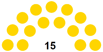 L'évolution communale: 15 seats